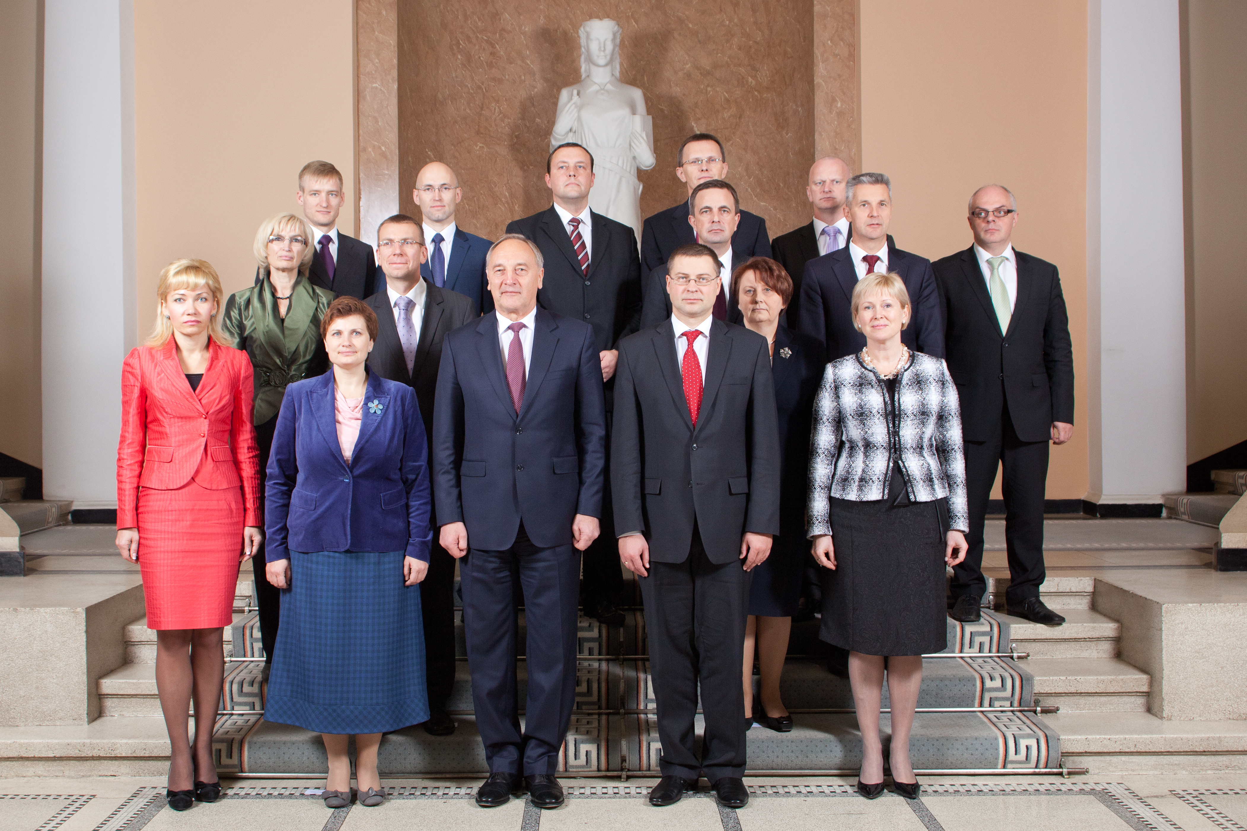 Attēlā (no kreisās): 1. rindā: Valsts kancelejas direktore Elita Dreimane, labklājības ministre Ilze Viņķele, Valsts prezidents Andris Bērziņš, Ministru prezidents Valdis Dombrovskis, kultūras ministre Žaneta Jaunzeme-Grende, 2. rindā: ārlietu ministrs Edgars Rinkēvičs, zemkopības ministre Laimdota Straujuma, 3. rindā: veselības ministre Ingrīda Circene, satiksmes ministrs Aivis Ronis, aizsardzības ministrs Artis Pabriks, izglītības un zinātnes ministrs Roberts Ķīlis, 4.rindā: vides aizsardzības un reģionālās attīstības ministrs Edmunds Sprūdžs, ekonomikas ministrs Daniels Pavļuts, iekšlietu ministrs Rihards Kozlovskis,finanšu ministrs Andris Vilks, tieslietu ministrs Gaidis Bērziņš.